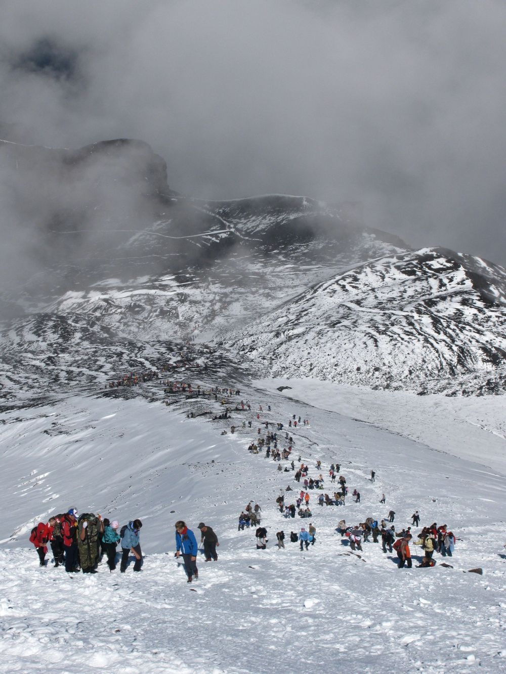 вид сверху на конус Авачинского вулкана во время массового восхождения.